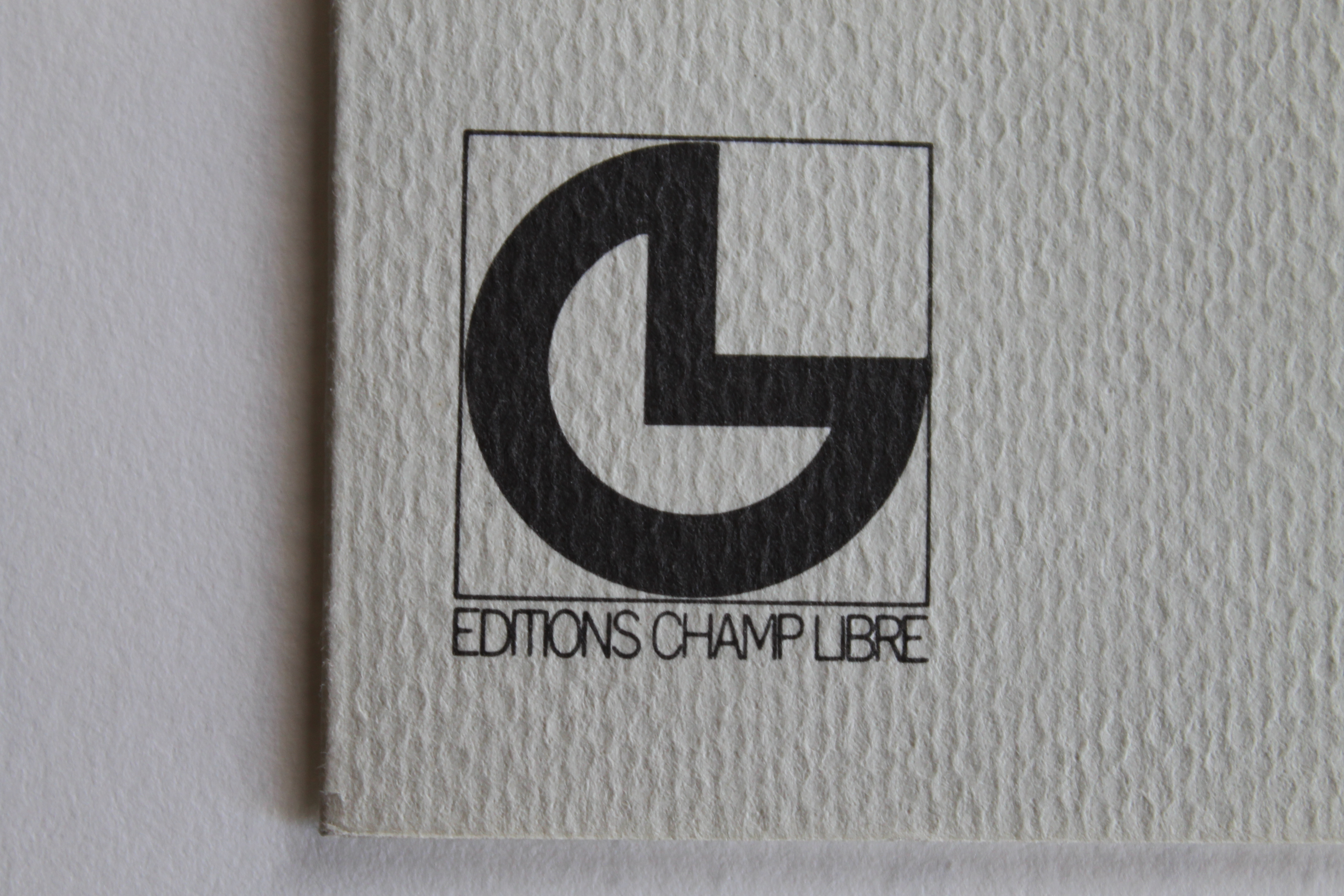 Logo de Champ Libre